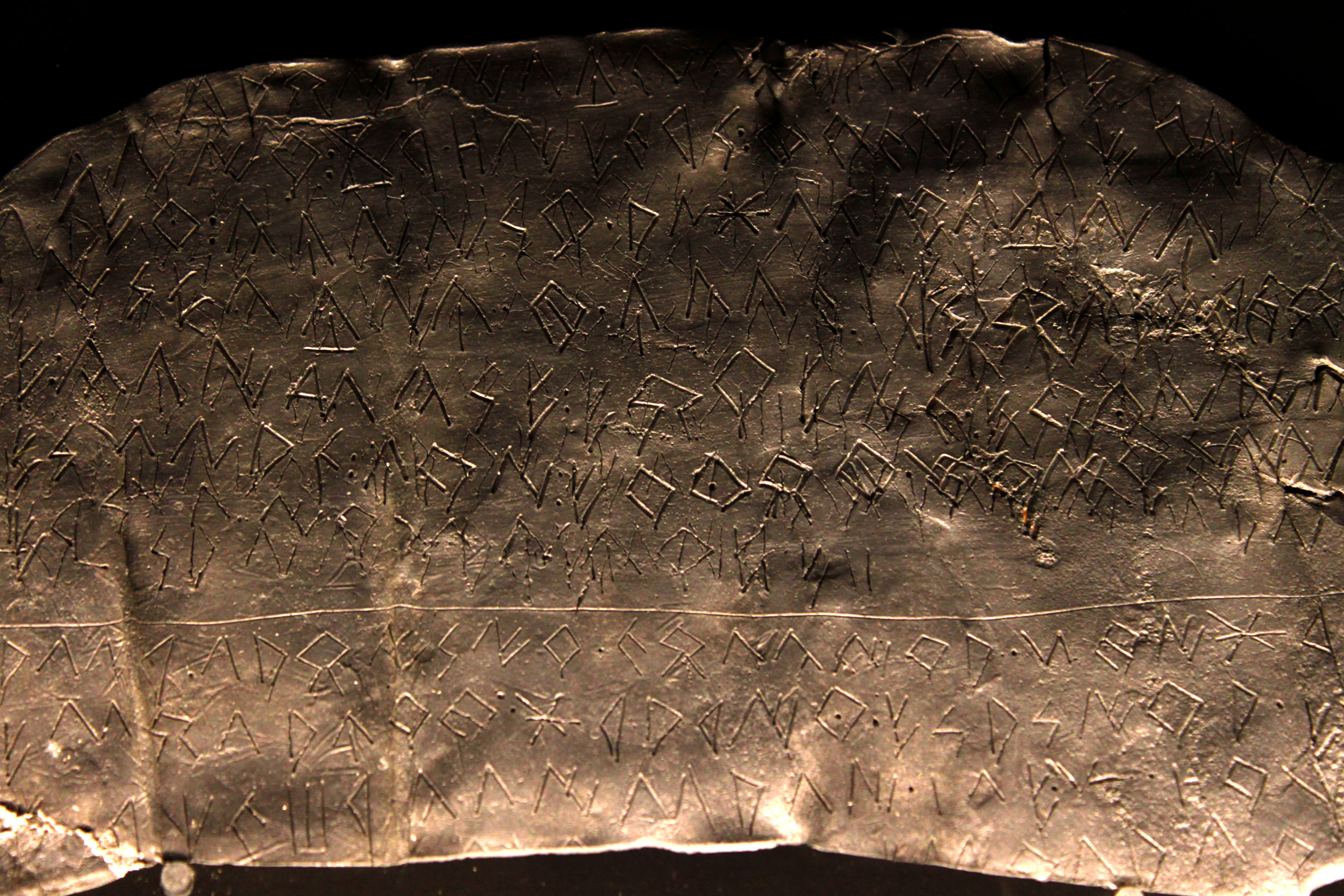 Detalle del plomo con inscripción ibera del yacimiento de Pico de los Ajos, Yatova, denominado "Pico de los Ajos II". El plomo mide 188 mm de longitud y 105 mm de anchura habiendo sido recortado por su parte inferior. Por la cerámica asociada del yacimiento se ha estimado que pertenecen a finales del siglo II a.C. y principios del siglo I a.C. Se localizan inscripciones en ambas caras mostrándose en la imagen la Cara A. Pieza depositada en el Museo de Prehistoria de Valencia, Comunidad valenciana, España.